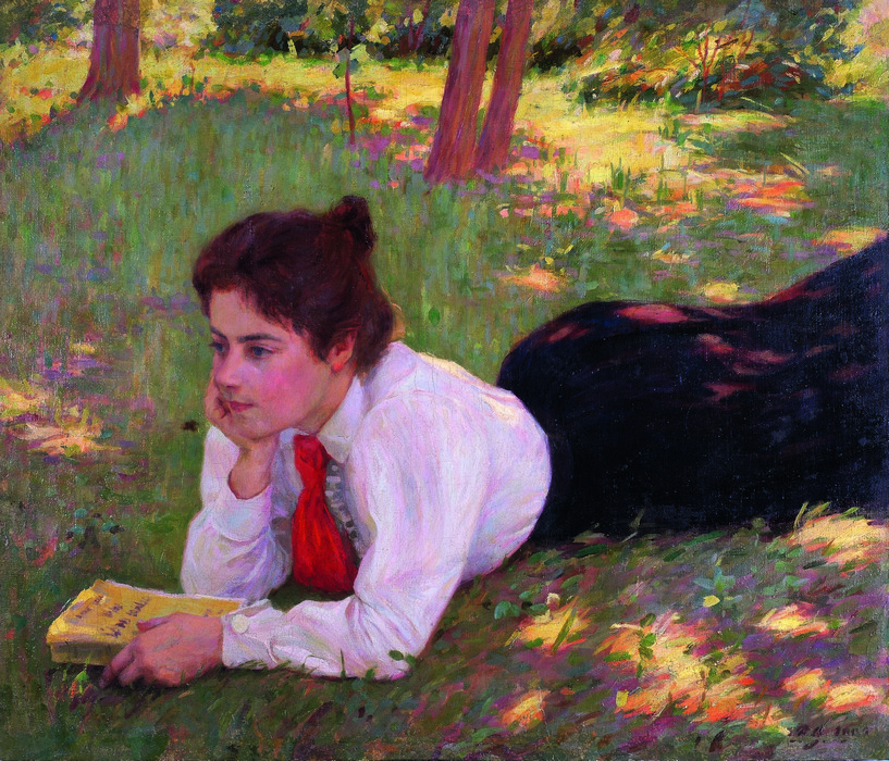 Ганский Пётр Павлович, портрет С.П. Быстрицкой (Ганской), (1893, холст, масло 75x82), Одесский художественный музей